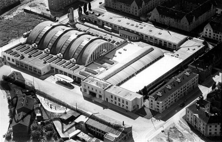 Moldegata - BjølsenOslo sporveier, Bussgarasjen, (1950), bussgarasje med verkstedet fra nordvest (Flyfoto).